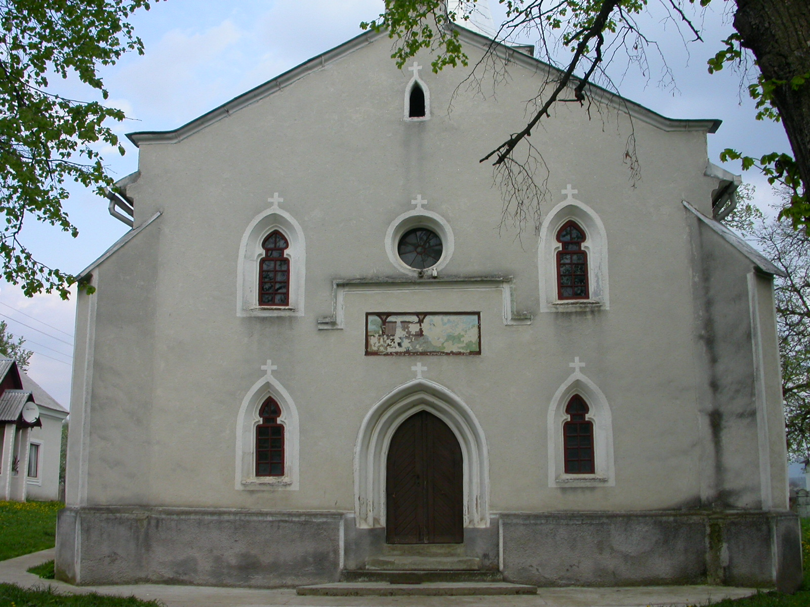 Biserica evanghelică C.A, azi biserica ortodoxă "Buna - Vestire" sec. XV